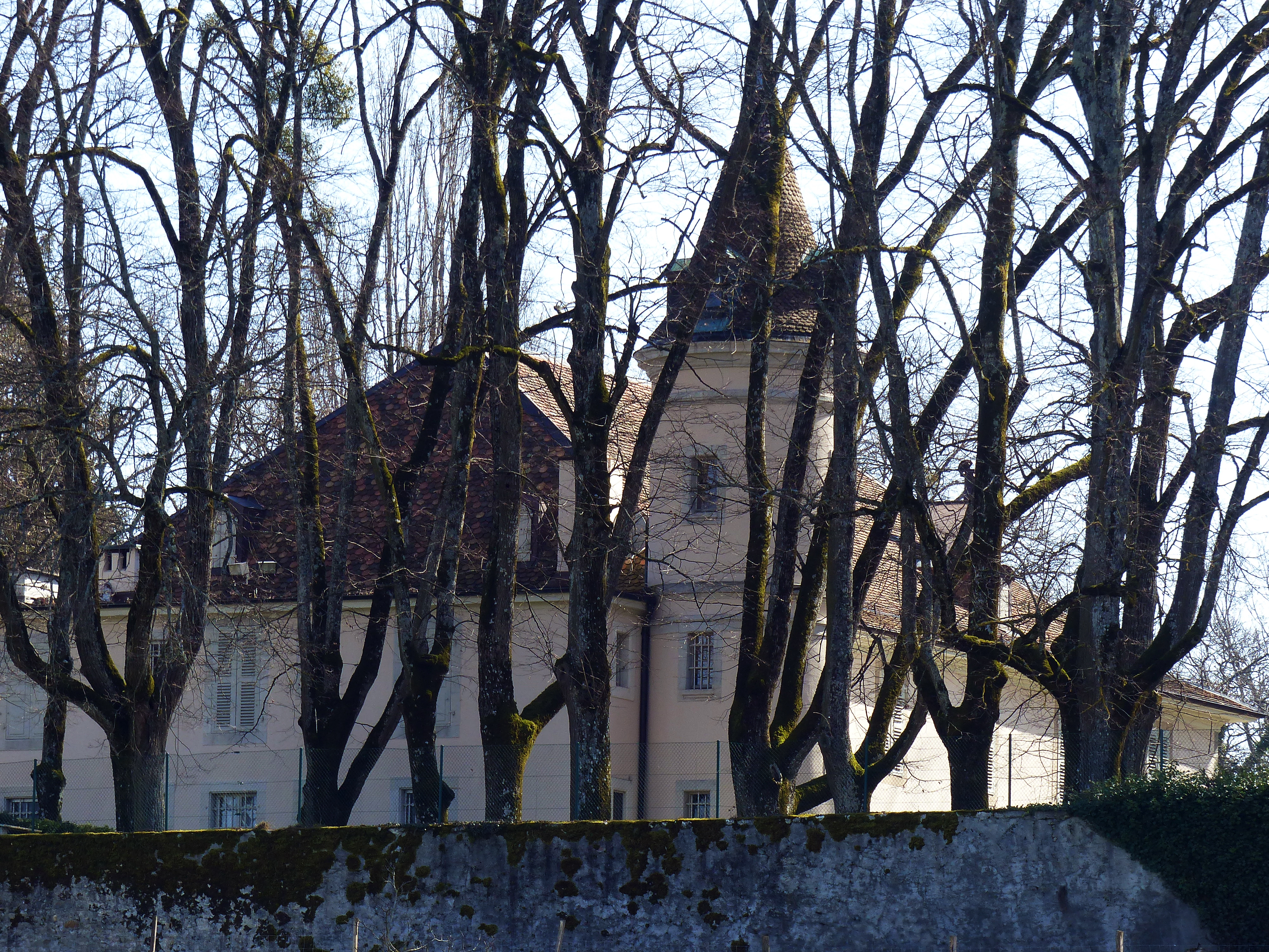 Schloss Collex